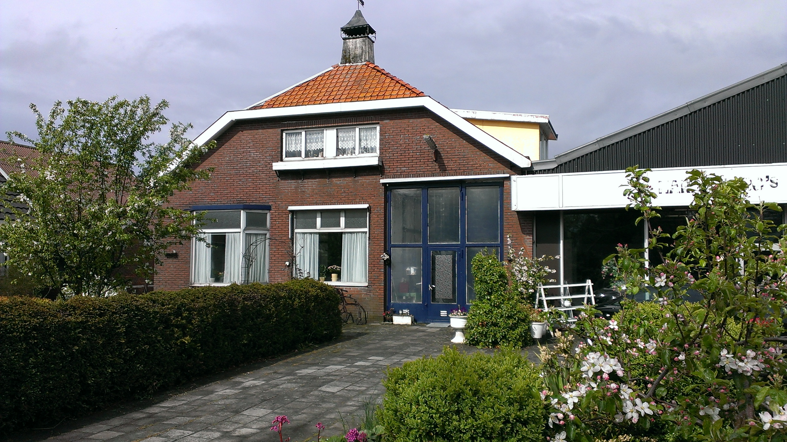 HJ Kniggestraat 19 in Stadskanaal, voor 1920 in gebruik geweest als remise van de Eerste Groninger Tramway-Maatschappij, in 2013 autogarage.